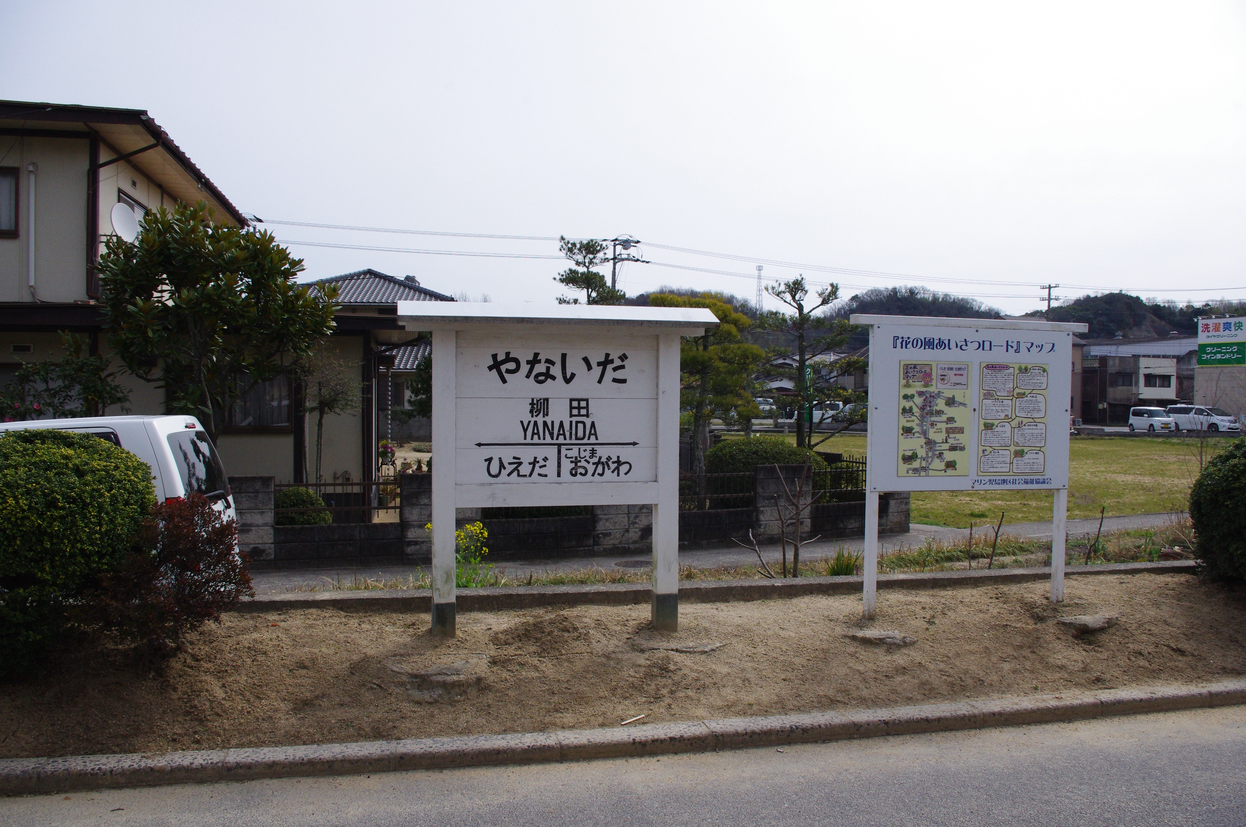 旧柳田駅跡（旧下津井電鉄）